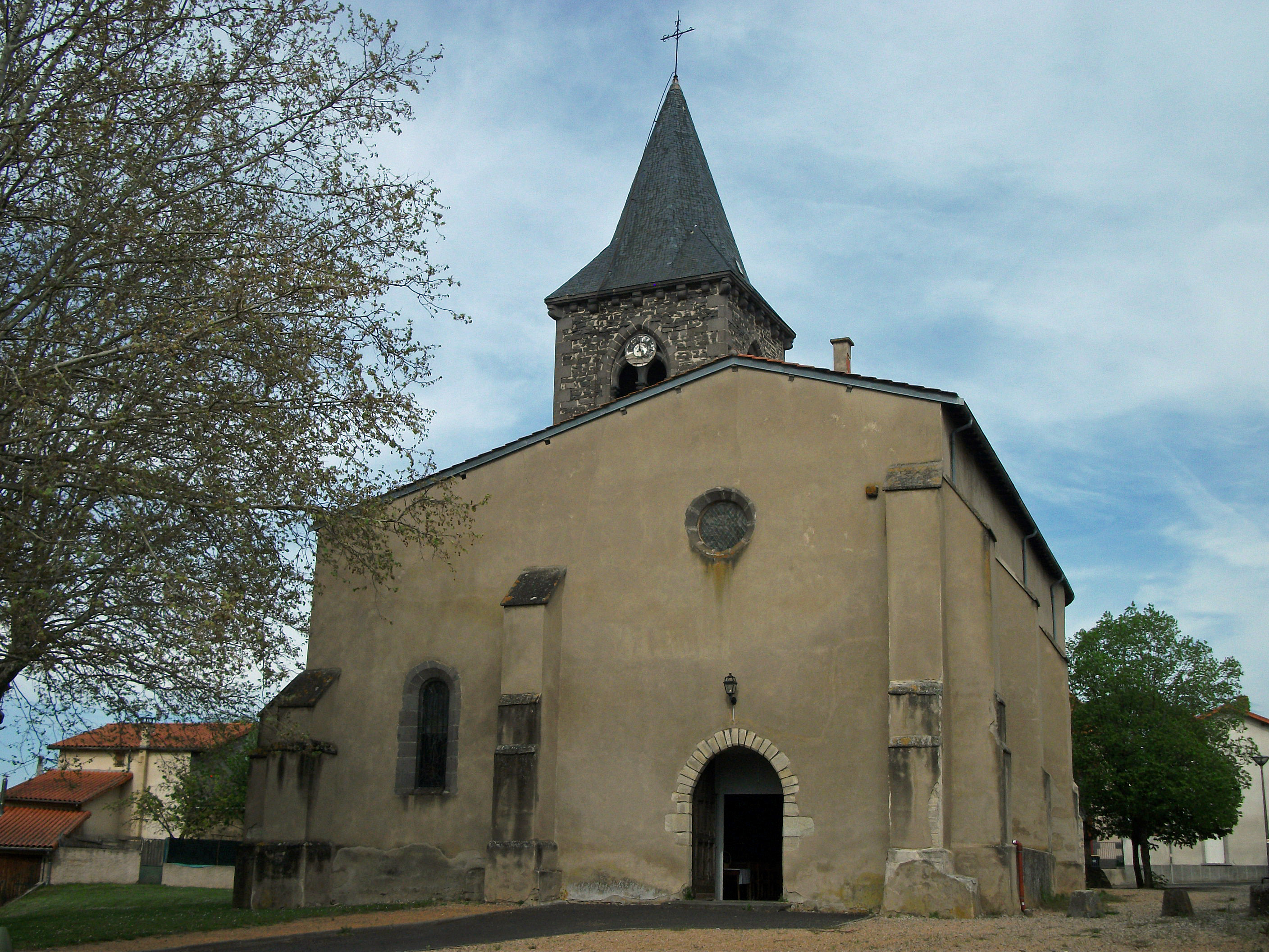 Church of Entraigues / Église d'Entraigues (Puy-de-Dôme) [10799]